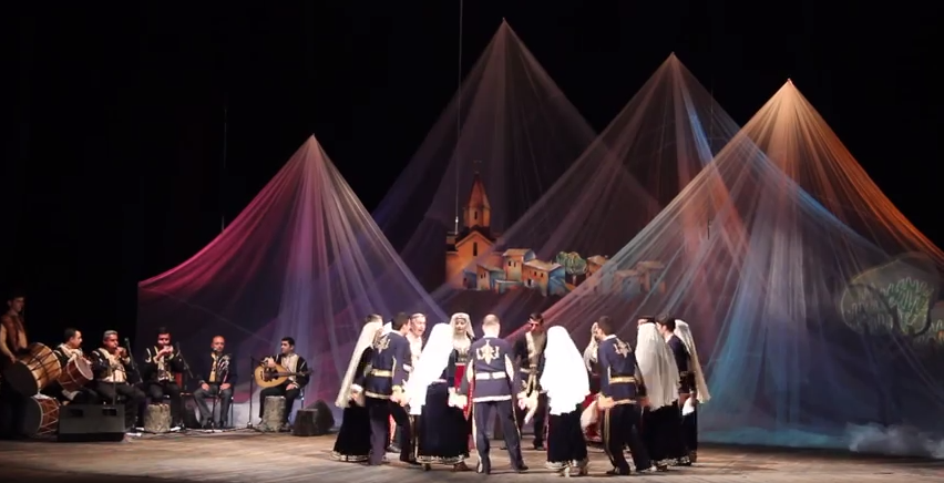 Թարս պար